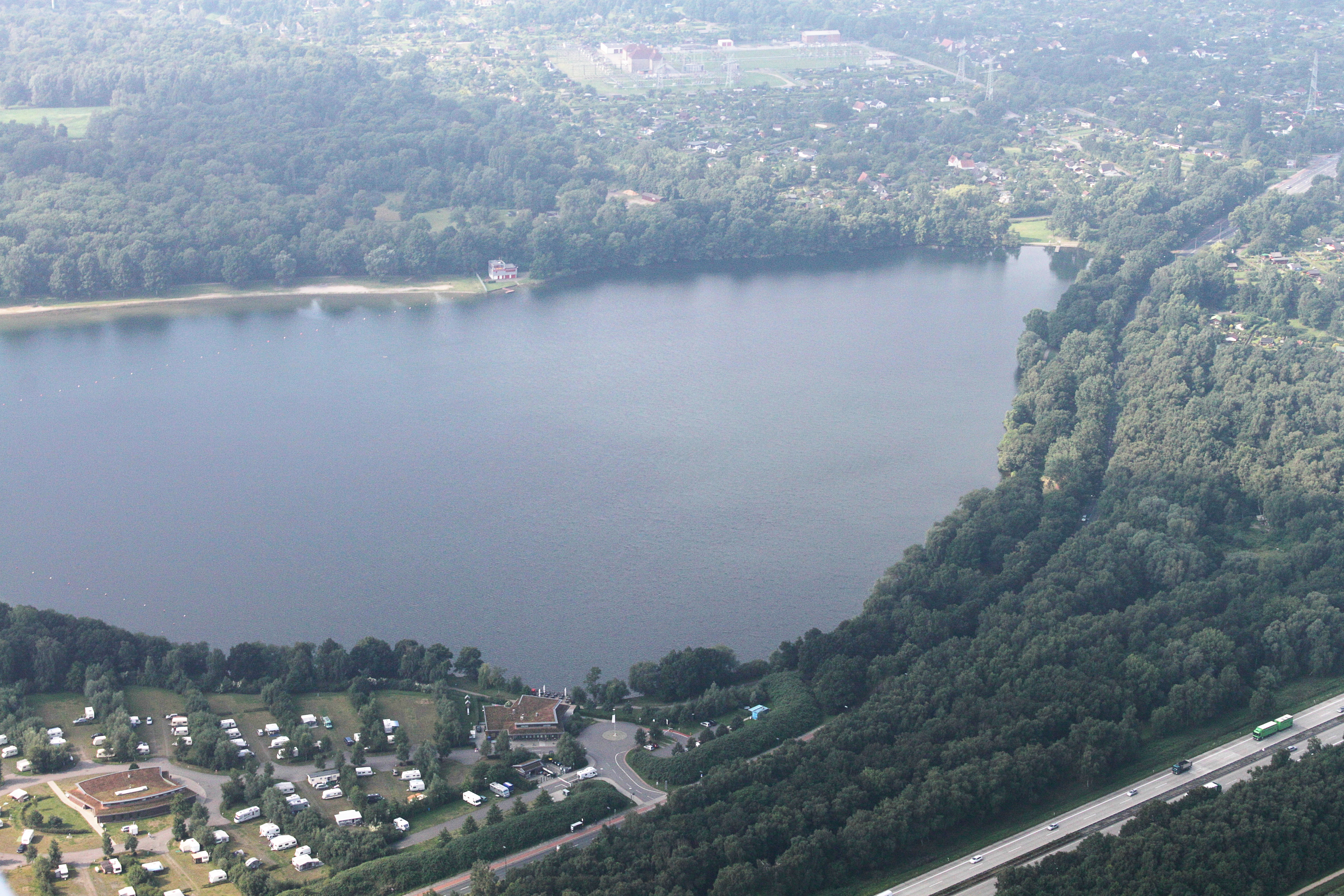 Unisee Fotoflug Bremen; Flughöhe 500 m; Uni Bremen bis Abfahrt Überseehäfen